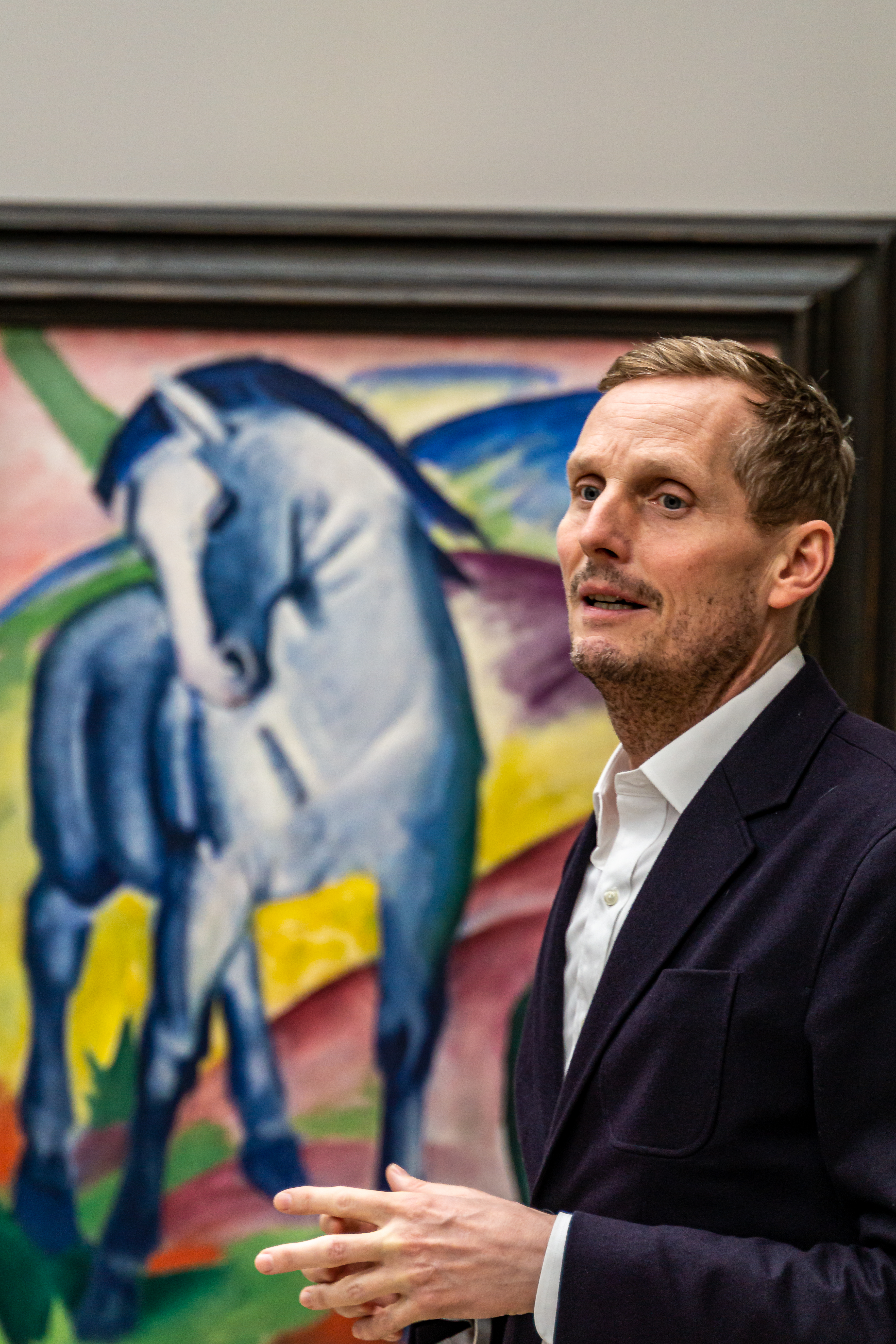 Matthias Mühling, Direktor der Städtischen Galerie im Lenbachhaus vor Franz Marcs Blaues Pferd I